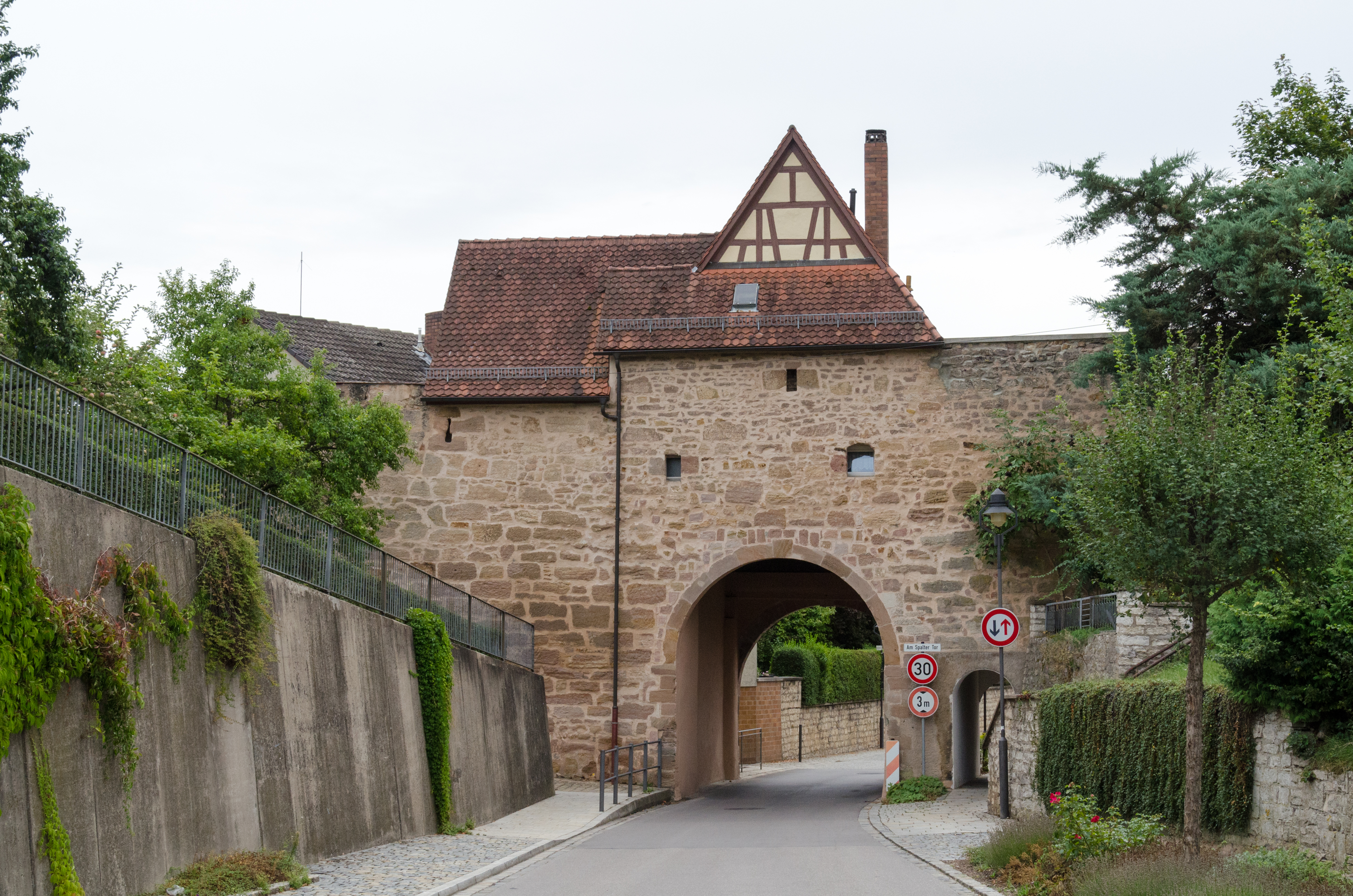 Pleinfeld, Spalter Tor, Feldseite